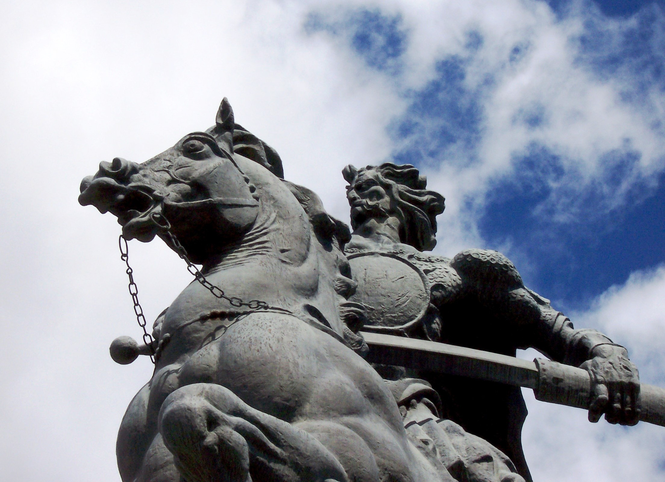 Giorgi Sakaadze Statue, Kaspi, Shida Kartli, Georgia